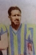 Restituto Brito